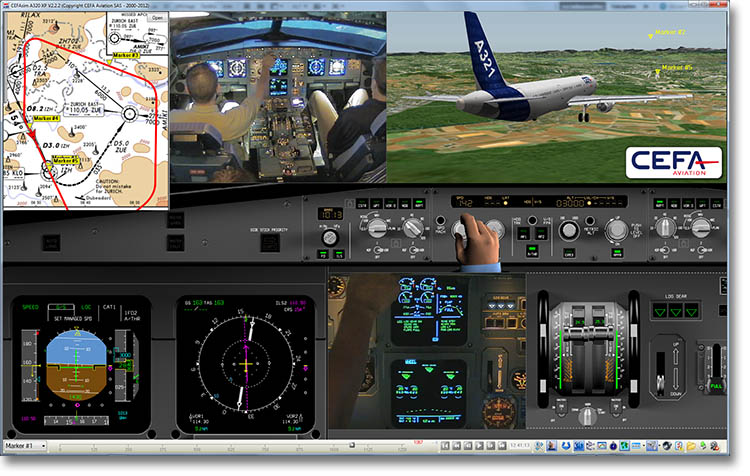 FOQA 프로그램 중 하나인 CEFA사의 FAS System